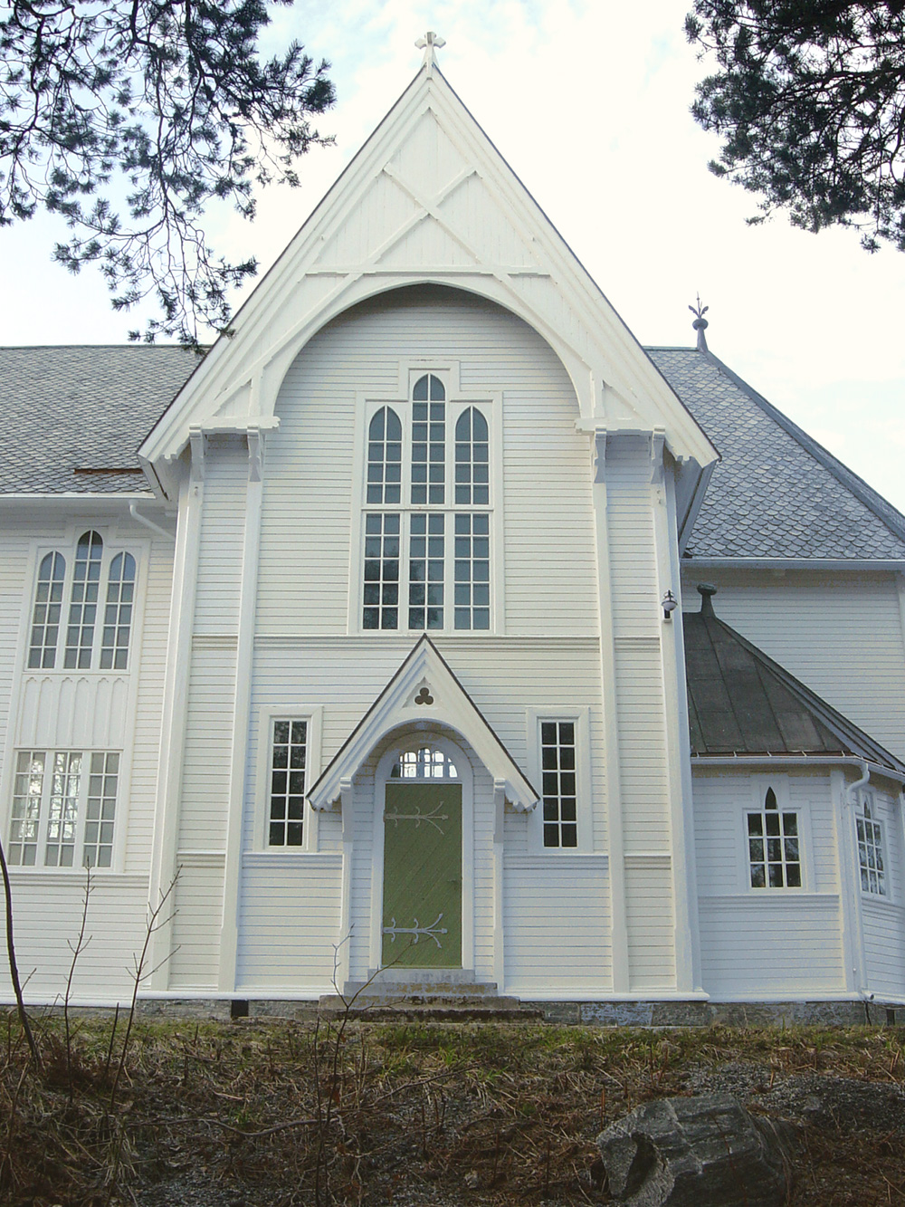 Molde and the Røbekk kirke